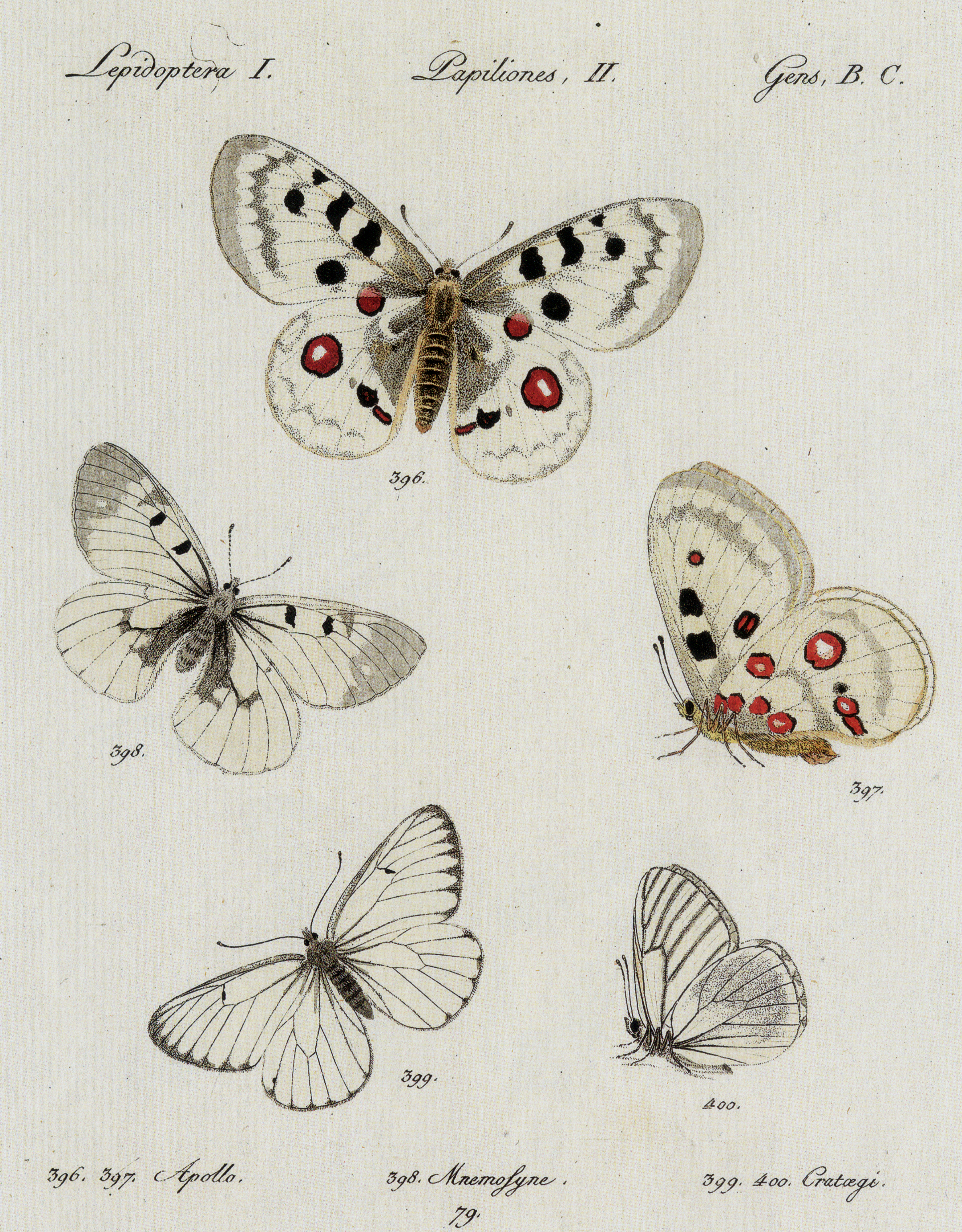 Illutration von Jacob Hübner von 1796